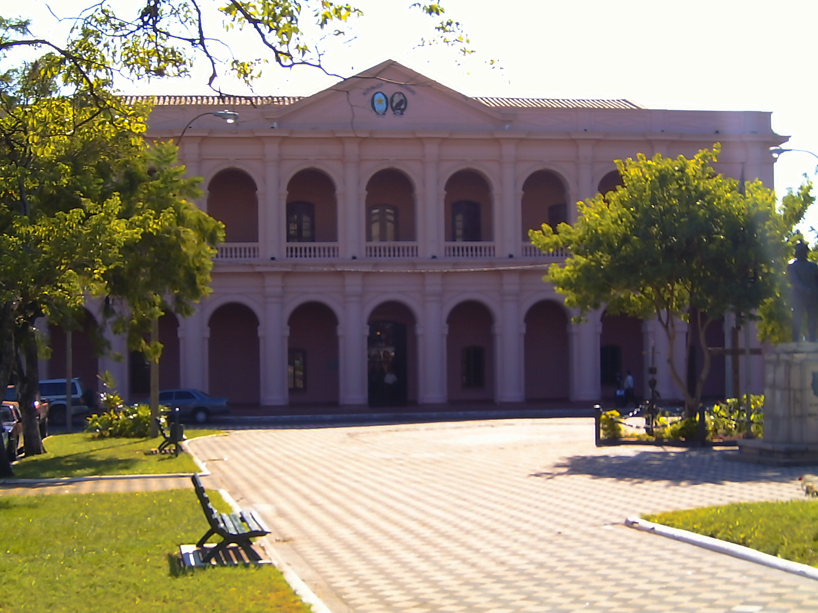 Cabildo in Asunción, Paraguay. It was constructed in 1844-54 and served as a seat of Parliament (Cámara de Diputados del Paraguay) in 1857-2003. Later, it was converted to a center of culture (Centro Cultural Cabildo) [1]